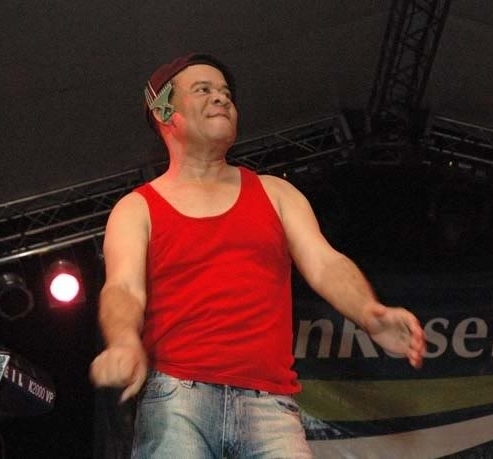 El humorista dominicano Luisito Martí caracterizando a Balbuena.